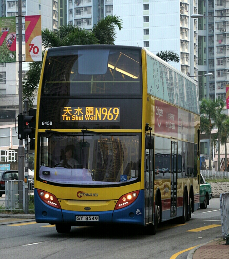 中文（香港）: 過海隧道巴士N969線，正途經天瑞路前往天水圍市中心